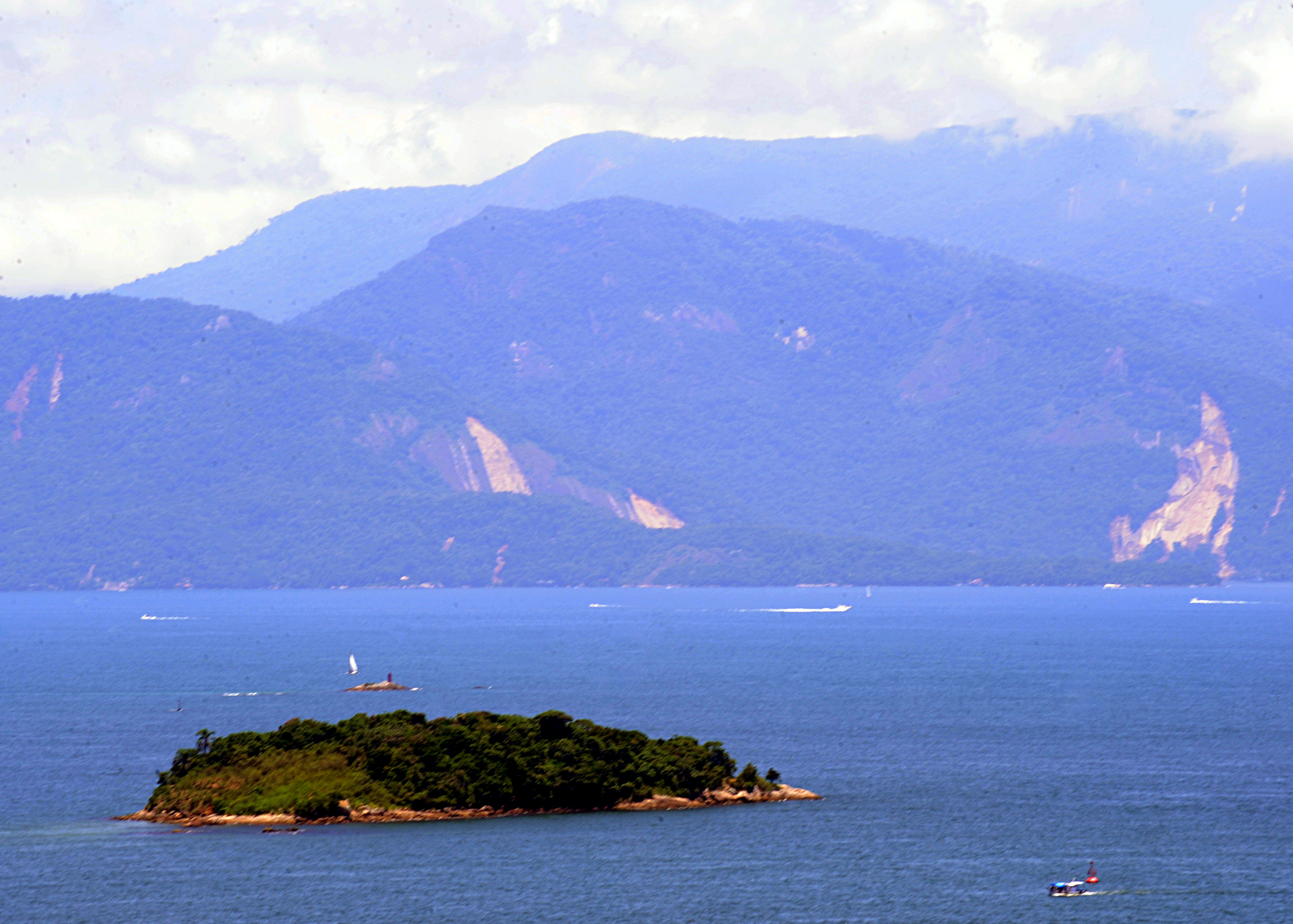 Angra dos Reis (RJ) - Vista de Angra, onde 17 pessoas já morreram por causa do deslizamento Foto: Roosewelt Pinheiro/ABr